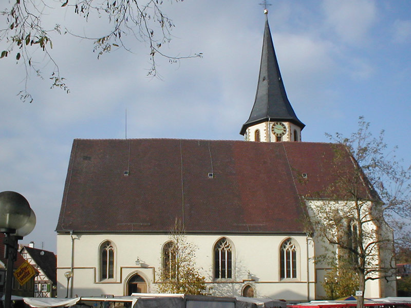 Evang. Michaelskirche in Kürnbach, Baden-Württemberg, Deutschland